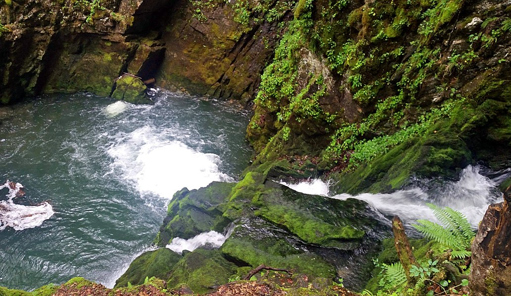 Das Hundloch am Wägitalersee, Kanton Schwyz